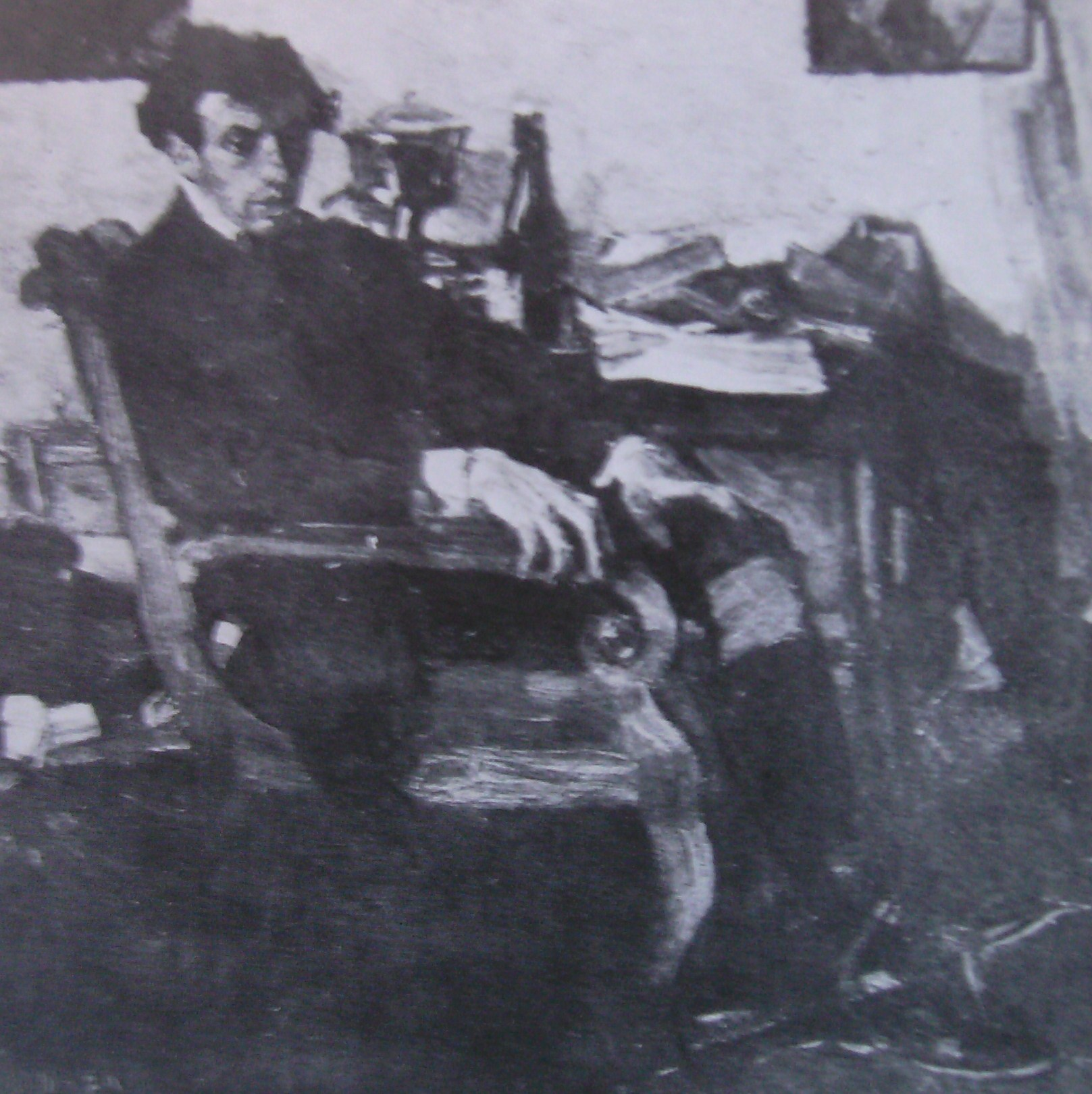 Portrait Hugo Steiner-Prag (Maler: Albert Weisgerber, 1905)